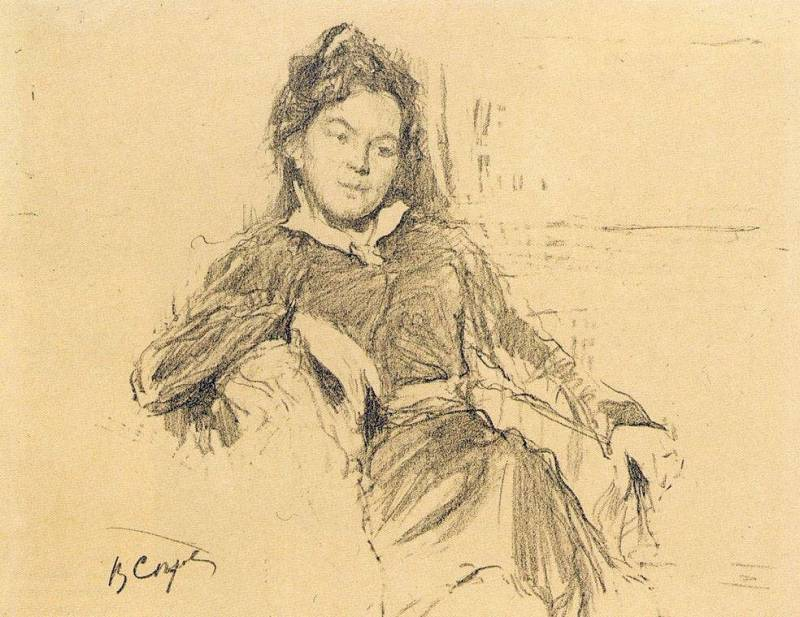 Остроумова-Лебедева, Анна Петровна